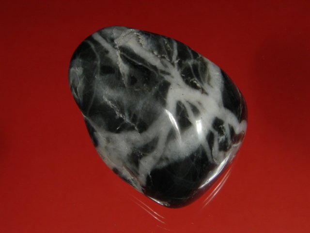 lidyt, pochodzenie Polska- Sudety, autor zdjęcia Piotr Gut